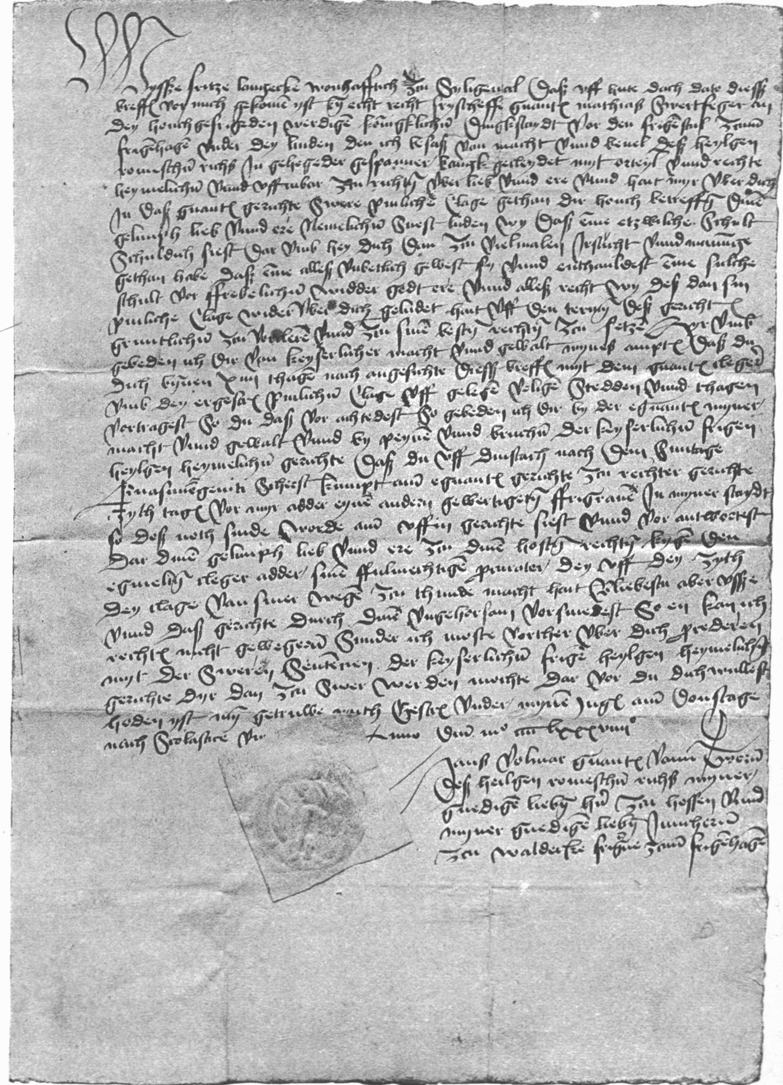 Femebrief von 1489: Verkleinerte Wiedergabe; Der Text des Femebriefes lautet: Wysse Fritze Langecke wonhafflich zu Seligenthal dass uff hute dach dato dieß breffs vor mich gekommen yst eyn echt recht fryscheffe genannt Mathias Swertfeger an dey houchgefrigenden werdigen königklichen Dings-staydt vor dem frigenstul zenn Frigenhagen under dey linden, den ich besaß von macht und bevehl deß heylgen römischen richs in gehegender gespanner bank, gecleydet myt orteyl unnd rechte heymellichen unnd uffenbar zu richten über lieb und ere unnd hatt myr über dich in daß genante gerichte swere pinliche Clage gethan, die houch betreffen dinen ...